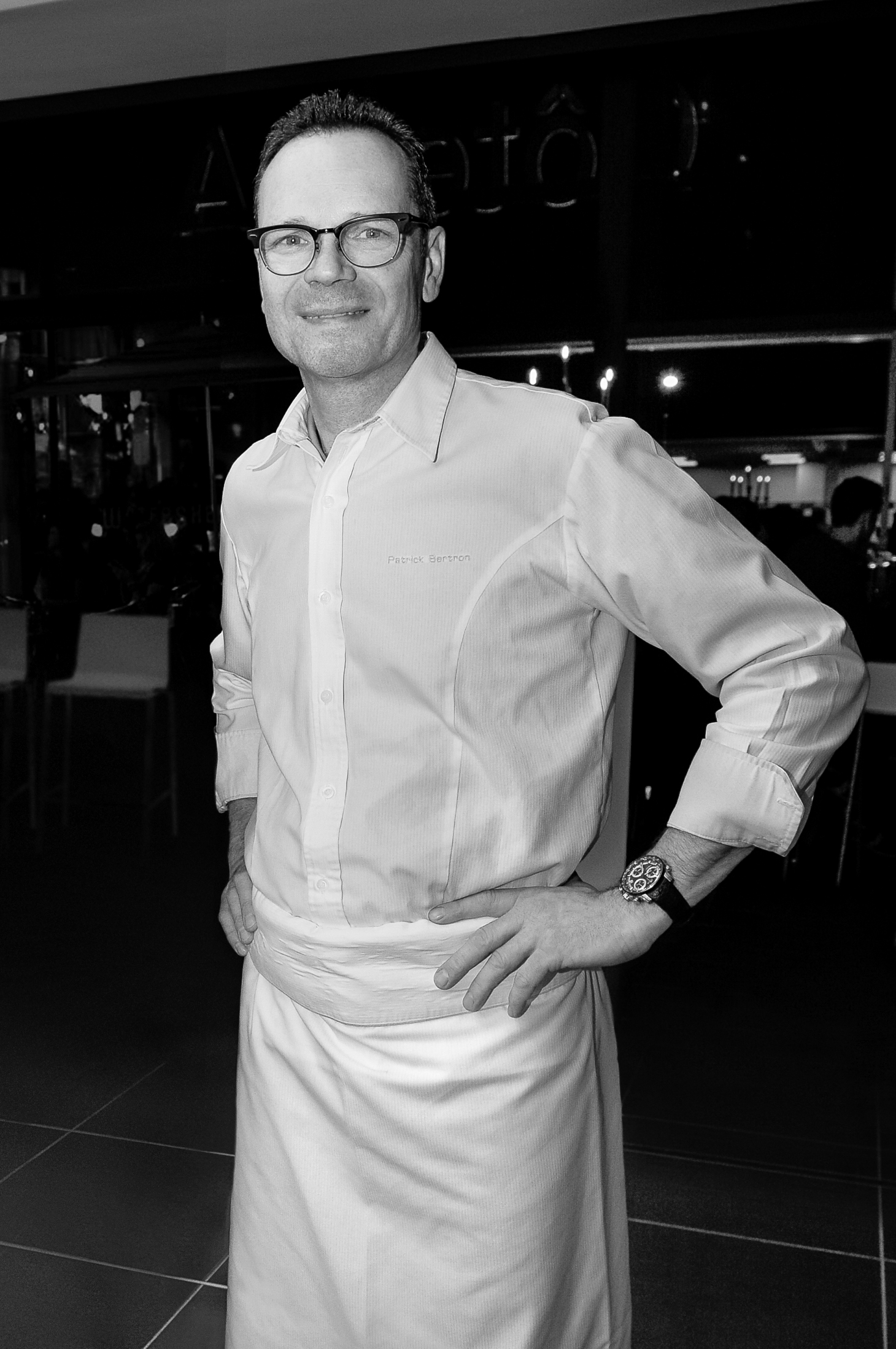 Patrick Bertron Portrait 2012